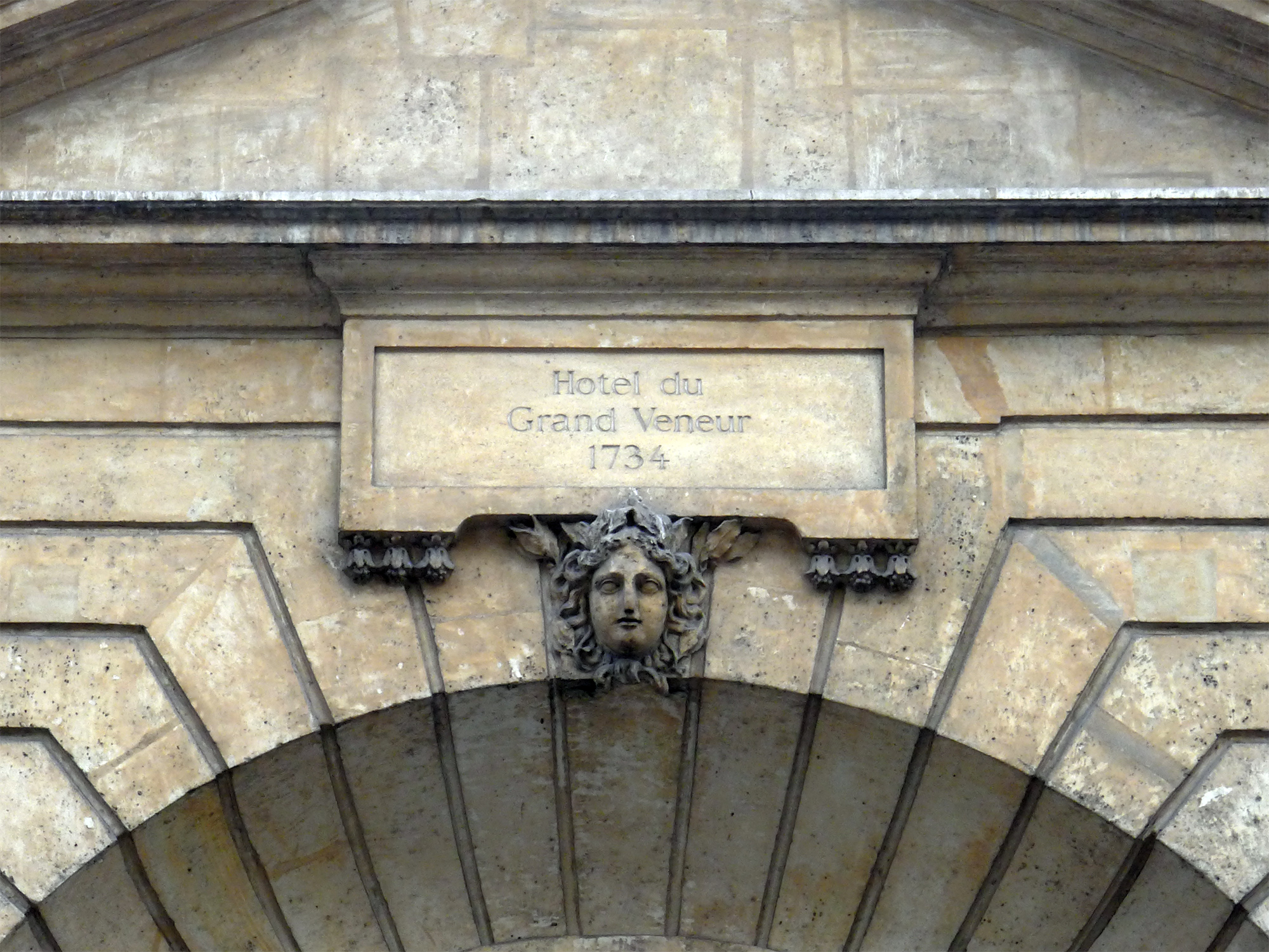 Rue de Turenne n°60 (Inscription et mascaron) - Paris III Hôtel du Grand-Veneur .